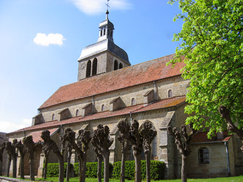 Eglise Sainte-Bénigne